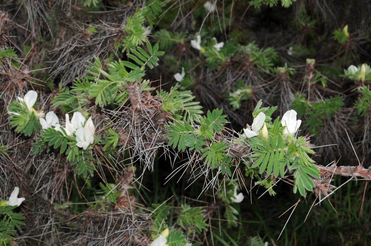 Caragana jubata, Palmengarten, Frankfurt am Main, Hessen, Deutschland